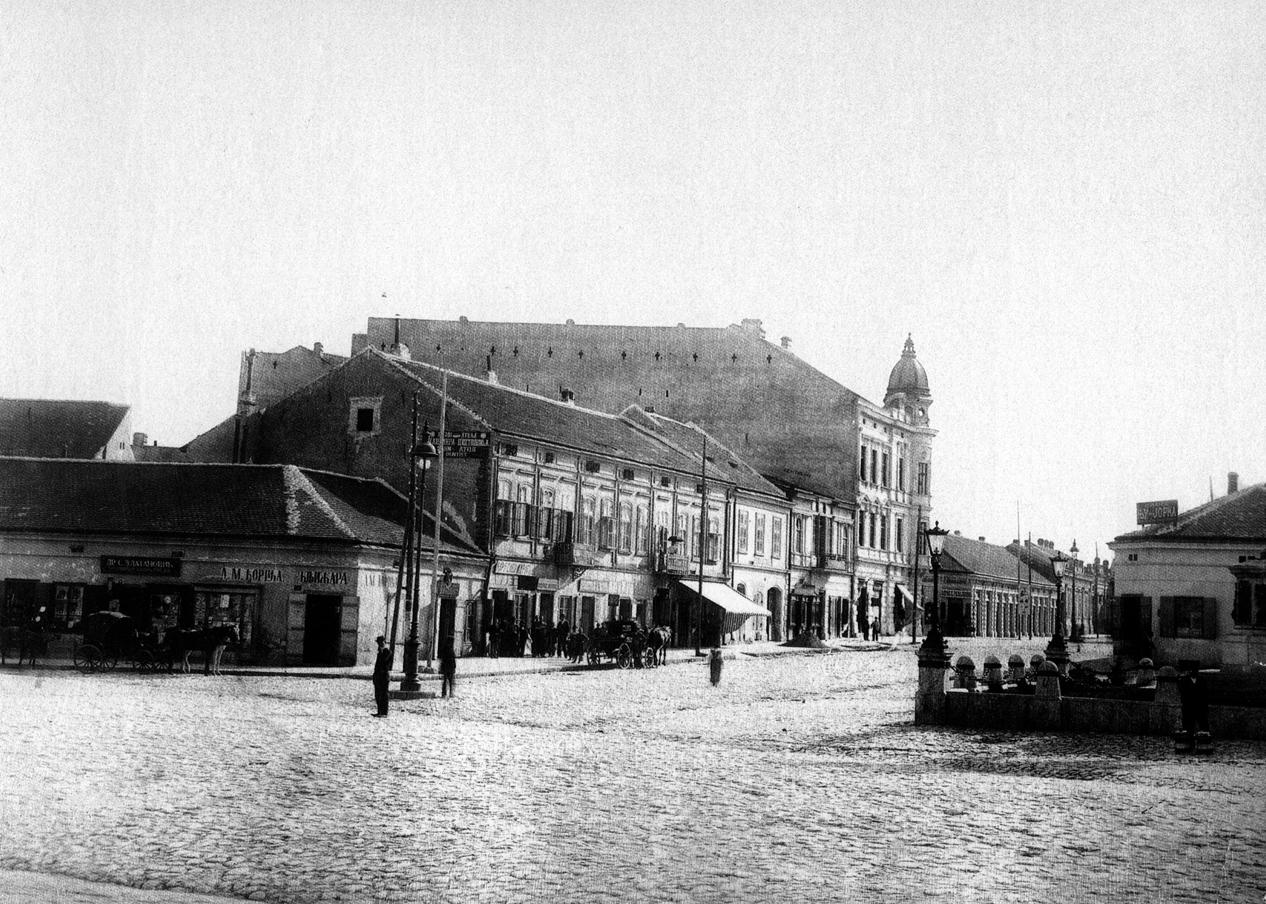 Belgrade